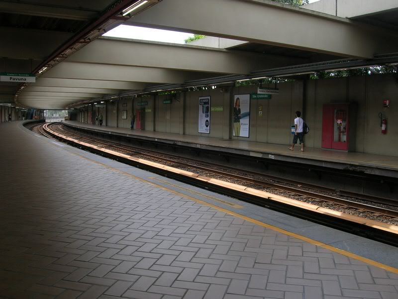 Estação São Cristóvão do Metrô Rio